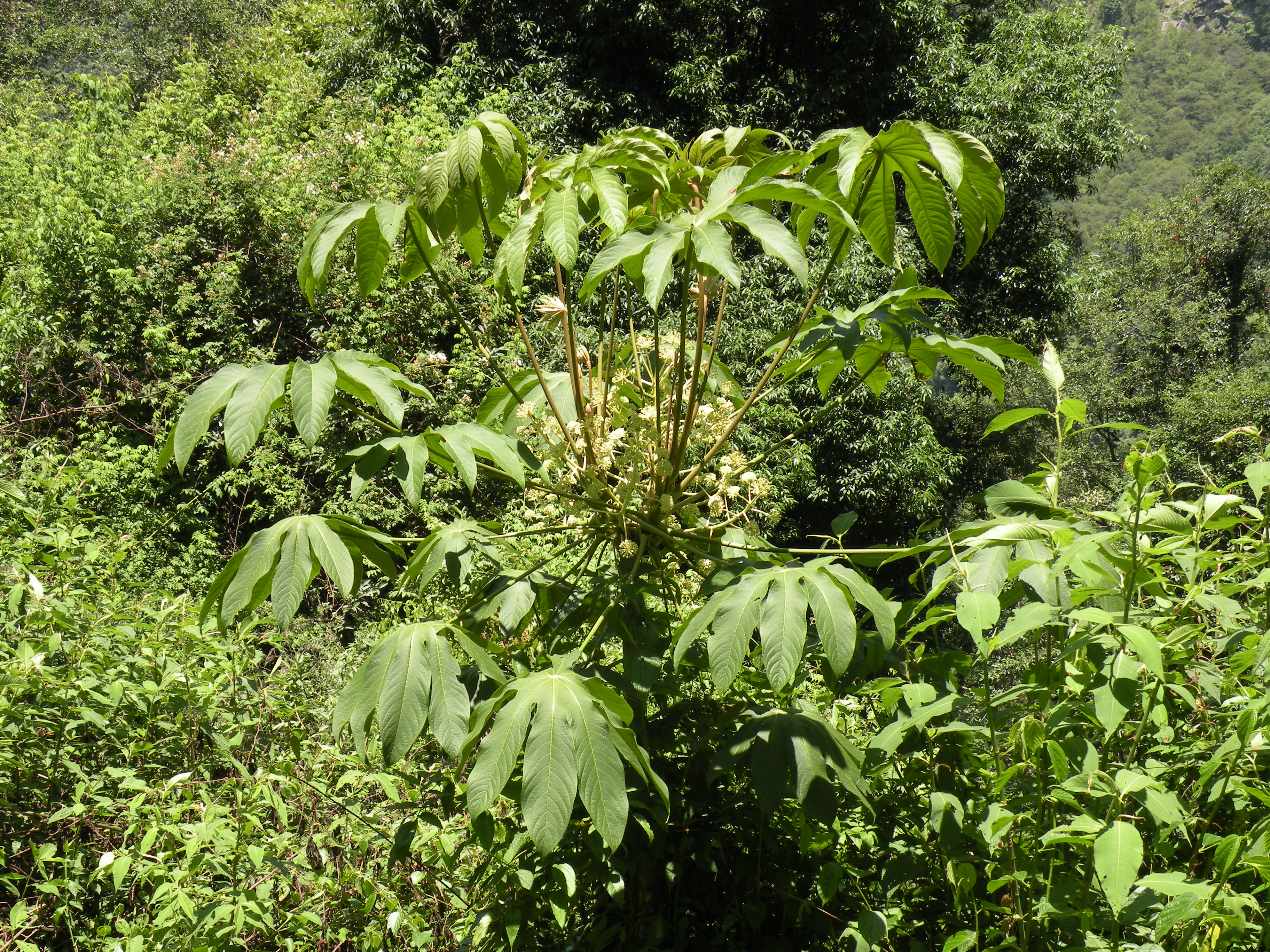 Brassiopsis mitis